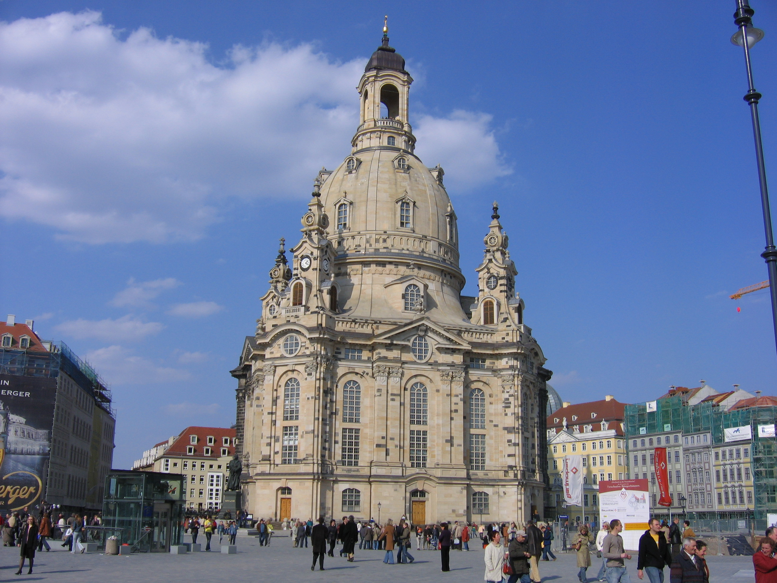 Dresden, Frauenkirche, im Jubiläumsjahr 800 Jahre Stadt Dresden